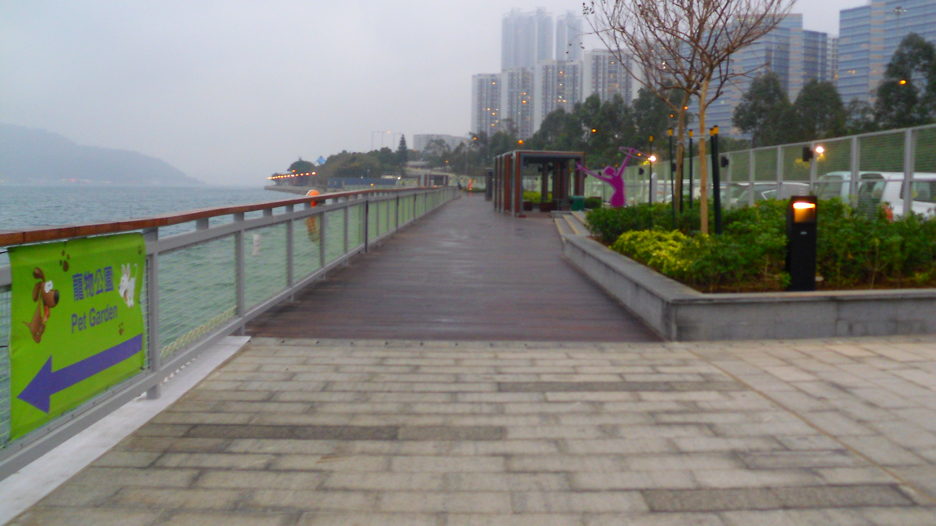 粵語: 鰂魚涌寵物公園